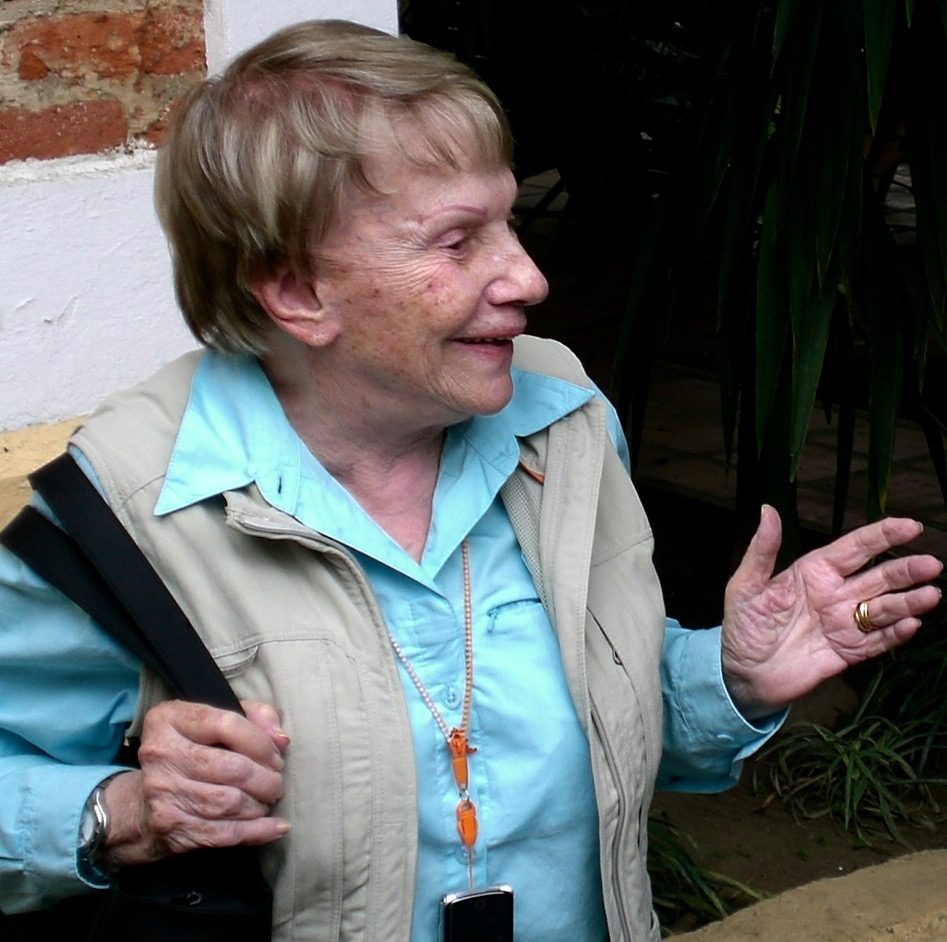 Sofía Ímber, periodista y promotora del arte en América Latina.